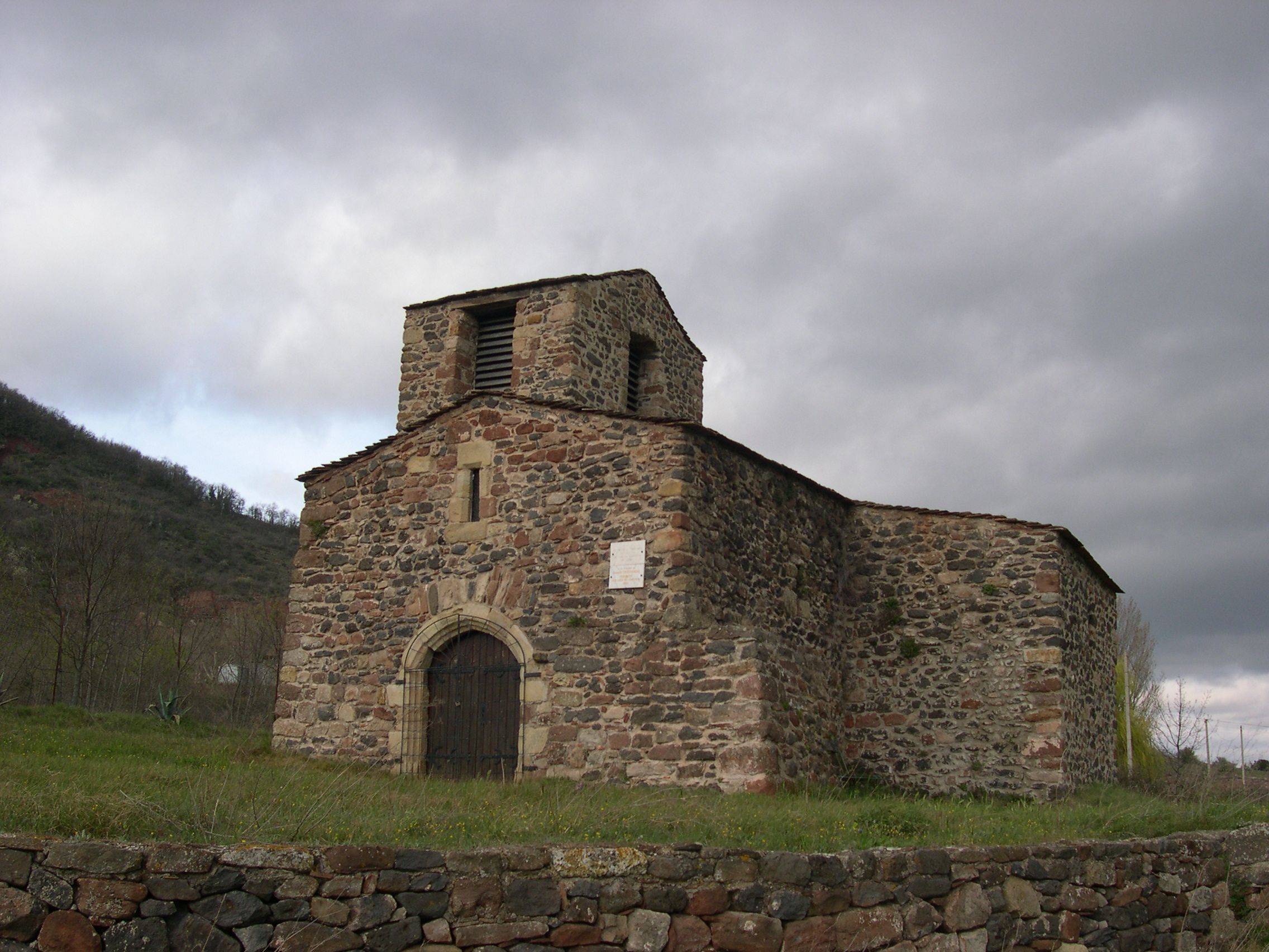 Antiga església de Sant Pere de Merifonts (Llenguadoc-Rosselló)